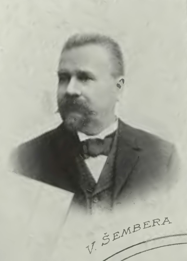 Portrét – Vincenc Šembera (1839-?), Český velkostatkář a politik.